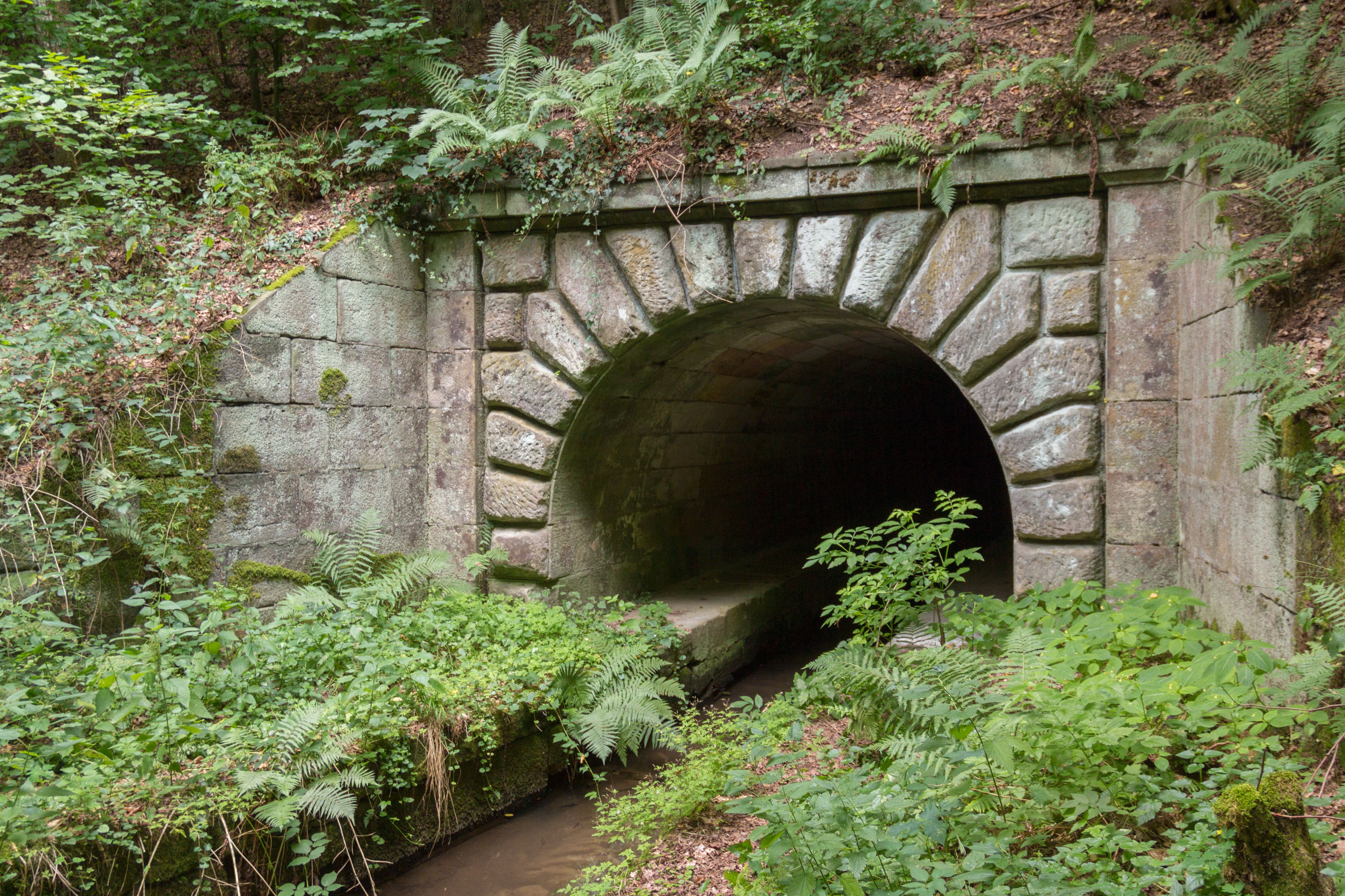 Ludwig-Donau-Main-Kanal, Mühlbach, Durchlass, Burgthann, West, Auslauf